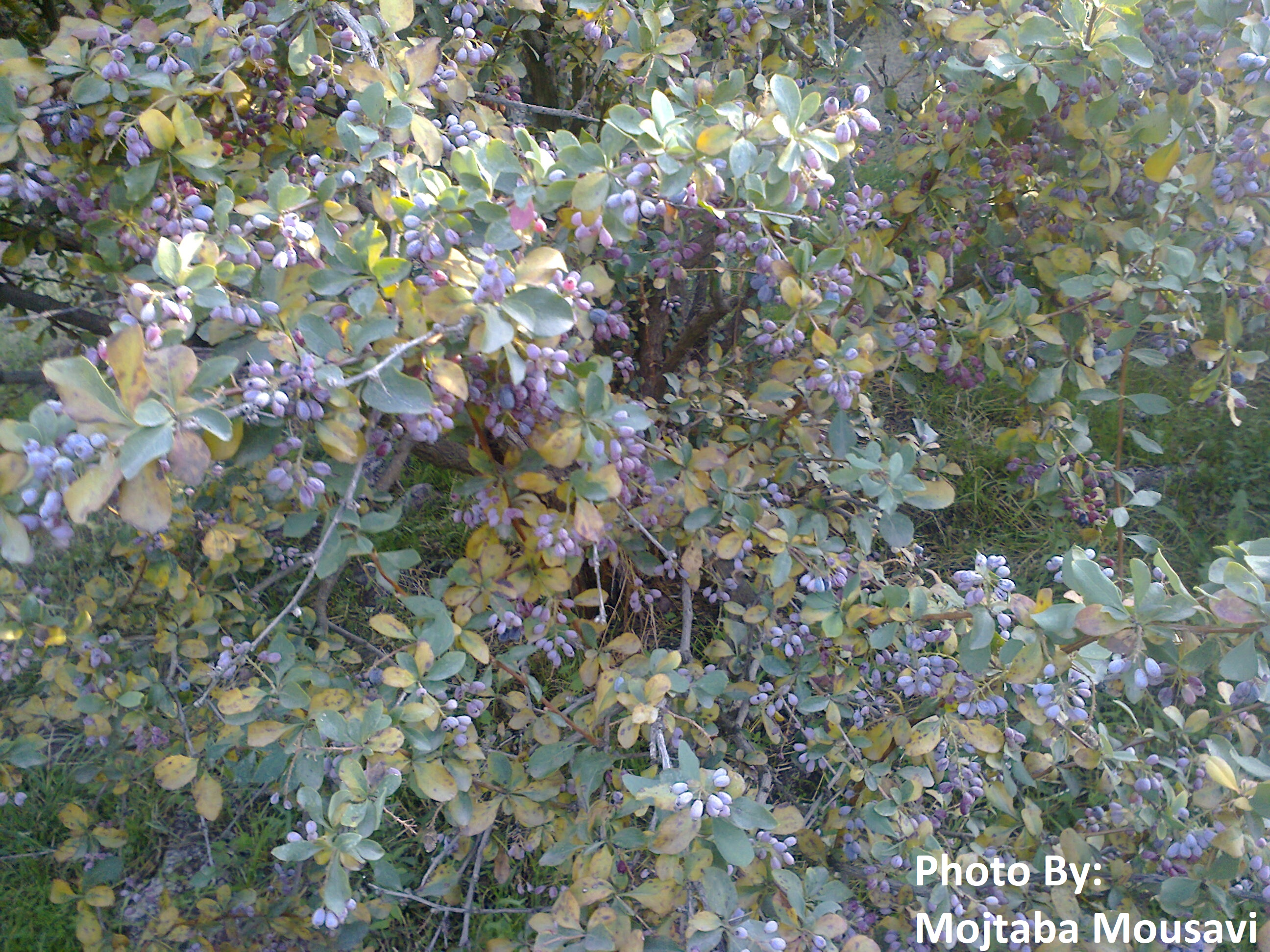 عکاس:مجتبی موسوی